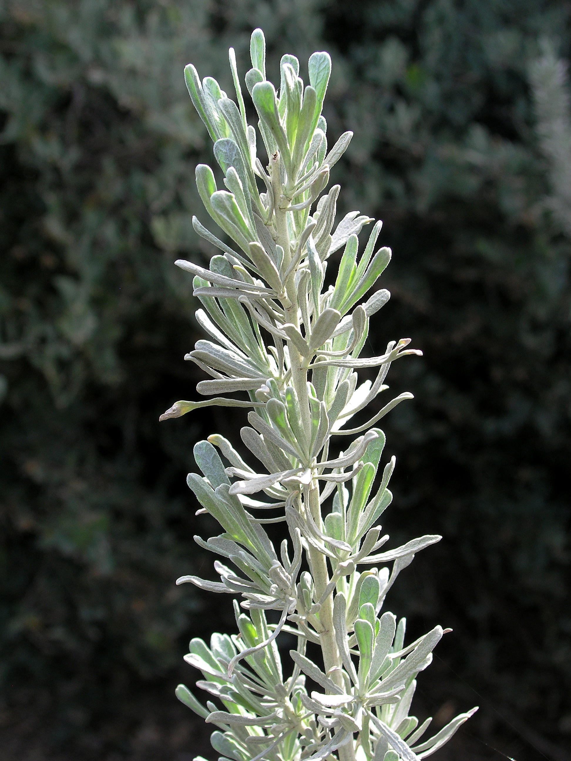 Great Basin Sagebrush (Artemisia tridentata)